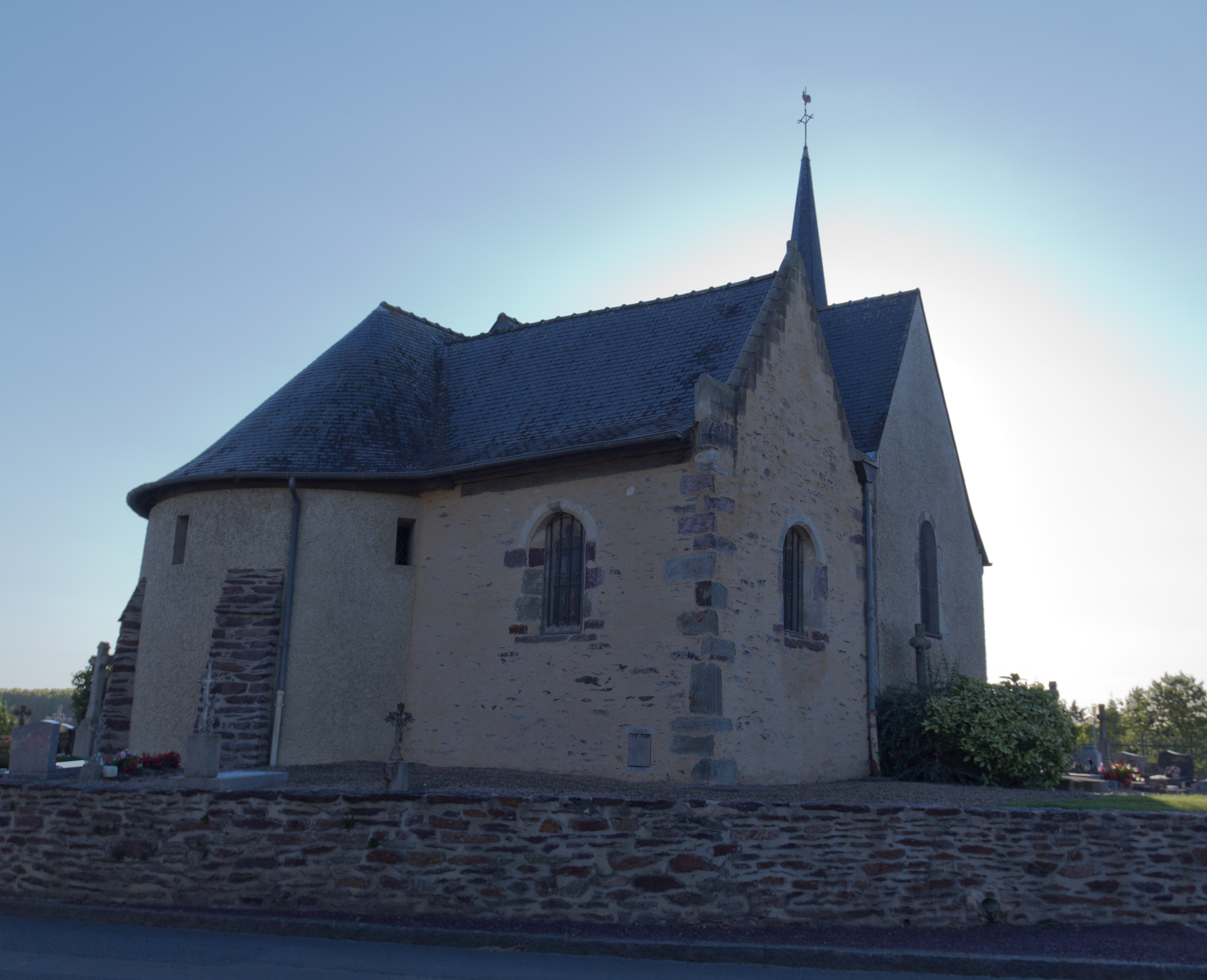 La chapelle du XVième siècle, actuelle sacristie, s'élève entre le transept et l'abside de l'église. .